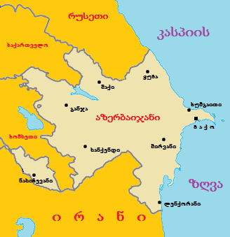 აზერბაიჯანის რესპუბლიკის რუკა.